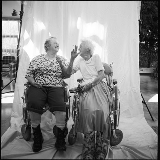 Eine Bühne für das Alter